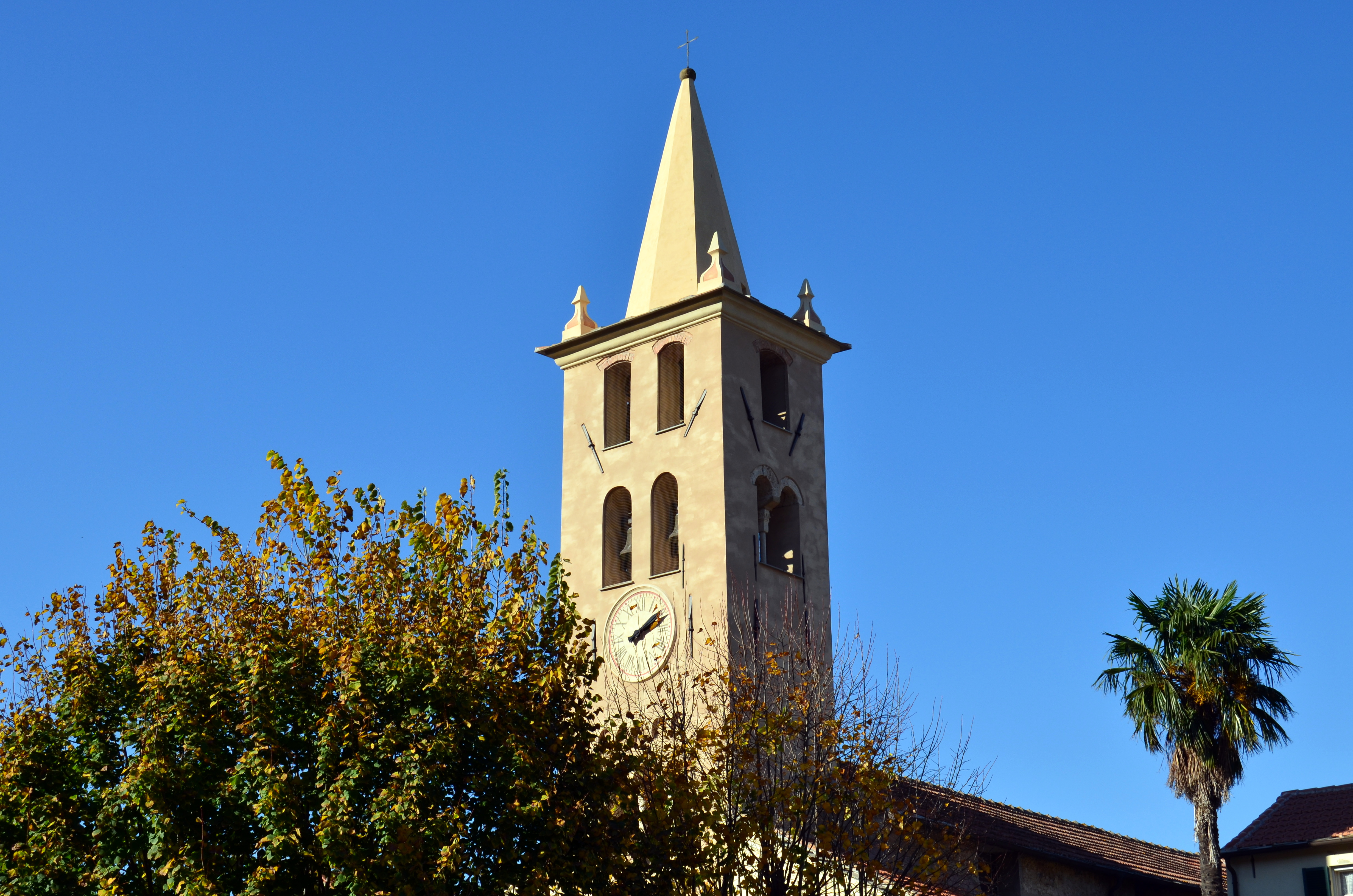 La chiesa dei Santi Simone e Giuda, San Fedele, Albenga, Liguria, Italia